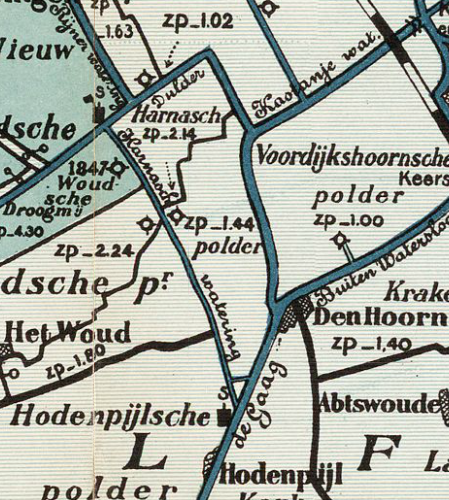 Harnaschpolder